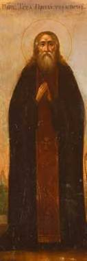 Тит, пресвітер Печерський (Saint Titus of Kyiv Caves) - ? - 1190 р. Ієромонах Печерського монастиря. Преподобний. Пам'ять 11 жовтня і 12 березня. Житіє преп.Тита, наведене в "Патерику Печерському" - повчальна притча, що закликає до незлостивості, християнської любові і прощення гріхів нашим ворогам. "Патерик Печерський" розповідає, що Тит, саном пресвітер, жив у великій дружбі з дияконом Євагрієм. Однак згодом їхні стосунки переросли у ворожнечу, таку непримиренну, що Євагрій не хотів пробачити Титові навіть тоді, коли той вмирав і зі сльозами просив прощення. За втручанням небесних сил хворий, який покаявся, нараз зцілився, а злостивець упав мертвим. Після цього Тит посилив свої подвиги і став чудотворцем. Його мощі спочивають у Ближніх печерах.